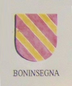 Cognomi storici dei Vicini che discendono dalle famiglie della Regola che abitavano a Predazzo e riguardano 19 cognomi: Boninsegna, Bonora, Bosin, Brigadoi, Defrancesco, Degaudenz, Dellagiacoma, Dellantonio, Dellasega, Demartin, Dezulian, Felicetti, Gabrielli, Giacomelli, Guadagnini, Morandini, Nicolao, Piazzi e Zanna.